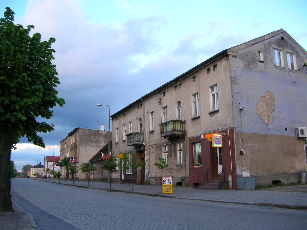 Witnica - ul.Gorzowska